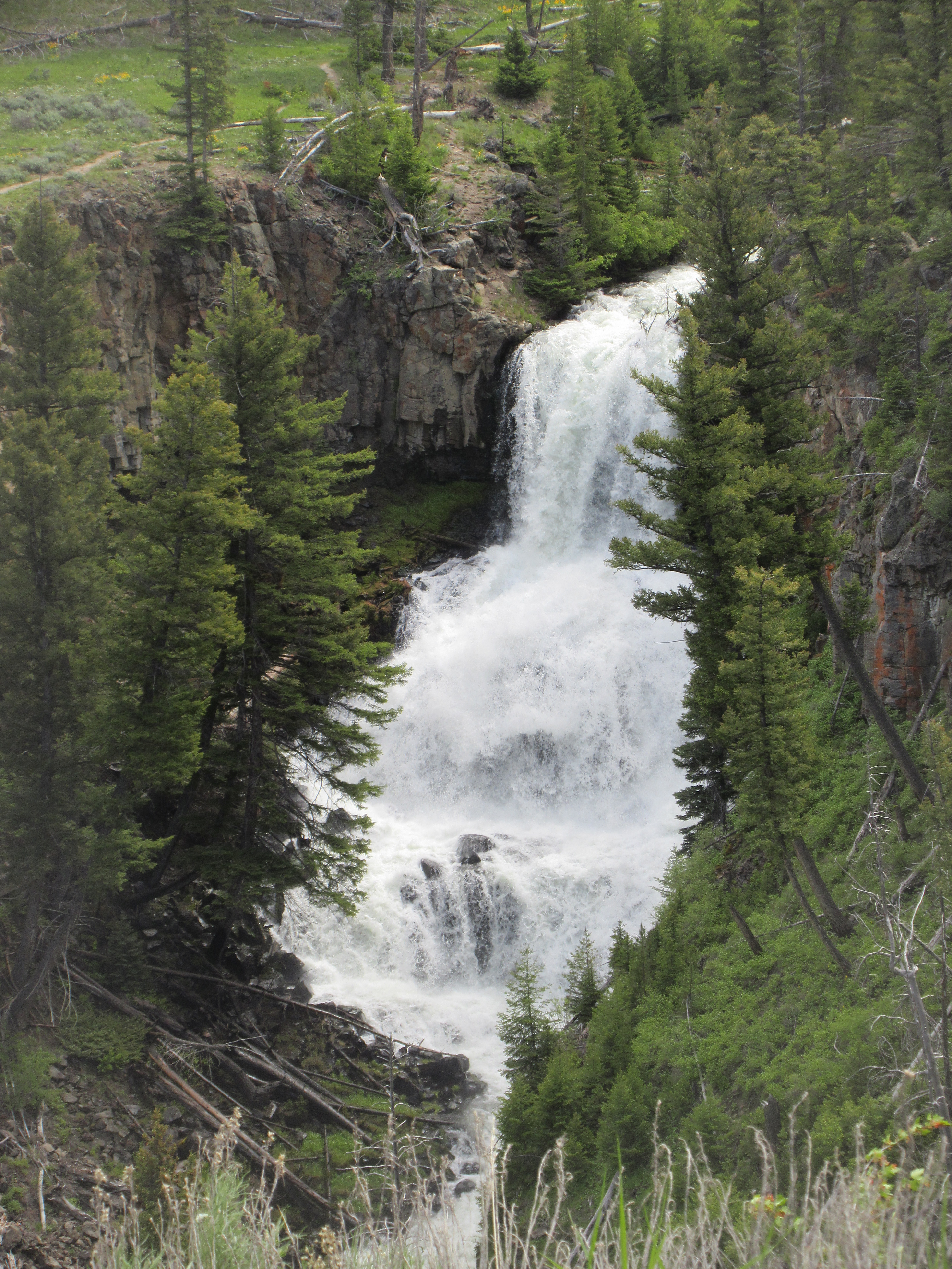 Undine Falls